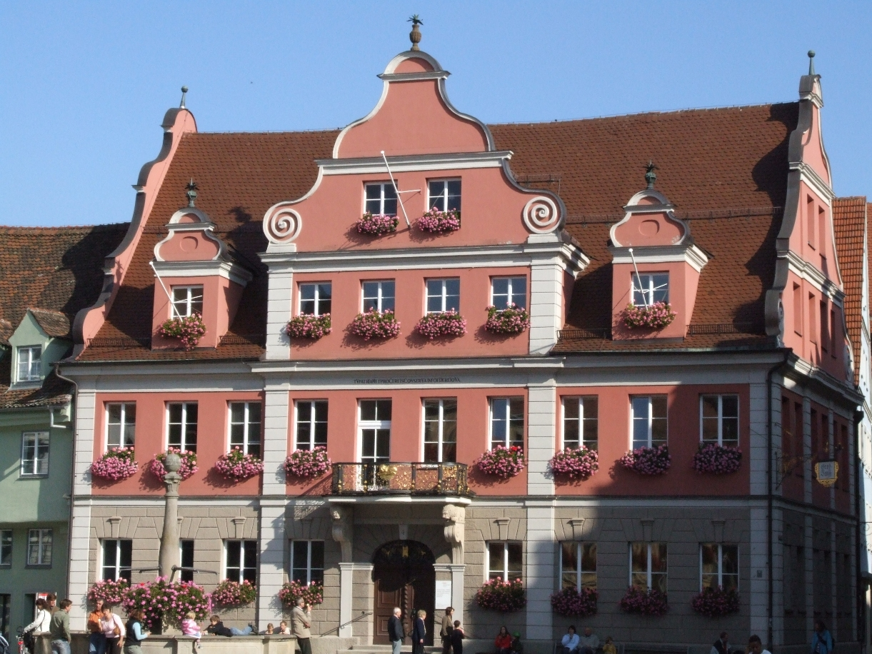 Die Großzunft in Memmingen am östlichen Marktplatz